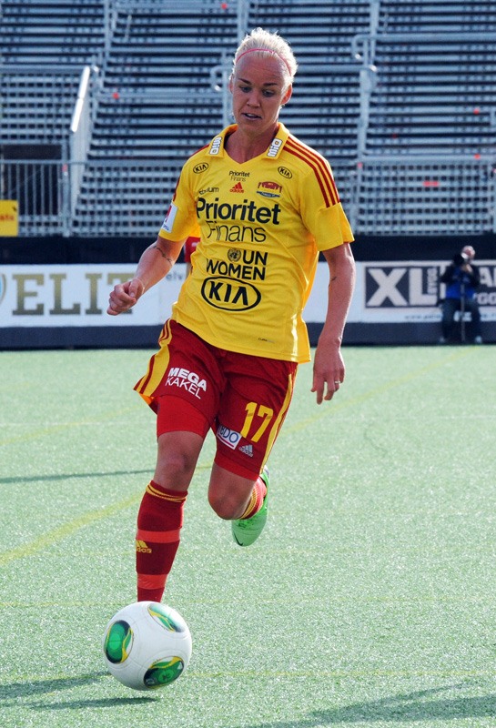 a_102_8509